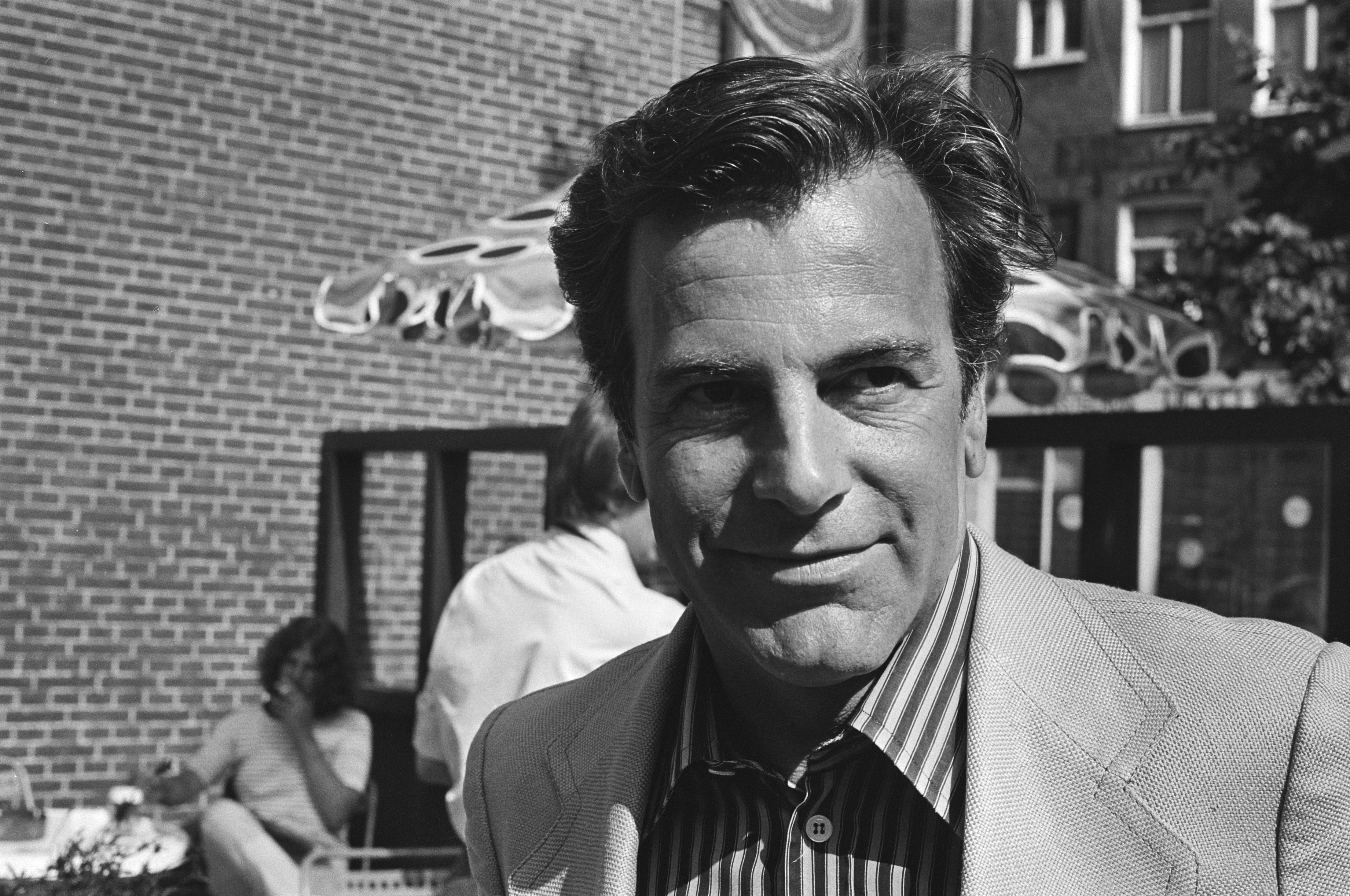 Collectie / Archief : Fotocollectie Anefo Reportage / Serie : [ onbekend ] Beschrijving : Acteur Maximilian Schell in " een Brug te Ver ", geeft persconferentie in , links producer Levine, recht Schell met laars bier Datum : 13 juni 1976 Locatie : Amsterdam, Noord-Holland Trefwoorden : acteurs, films, filmsterren, persconferenties, portretten Persoonsnaam : Schell Maximilian Fotograaf : Peters, Hans / Anefo Auteursrechthebbende : Nationaal Archief Materiaalsoort : Negatief (zwart/wit) Nummer archiefinventaris : bekijk toegang 2.24.01.05 Bestanddeelnummer : 928-6416